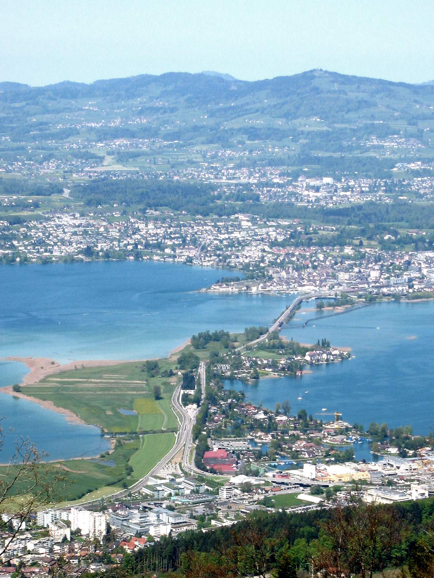 Seedamm Rapperswil vom Etzel aus gesehen